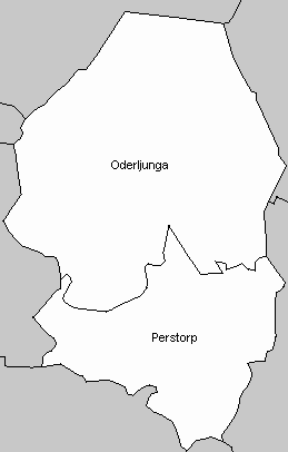 Socken in Perstorp